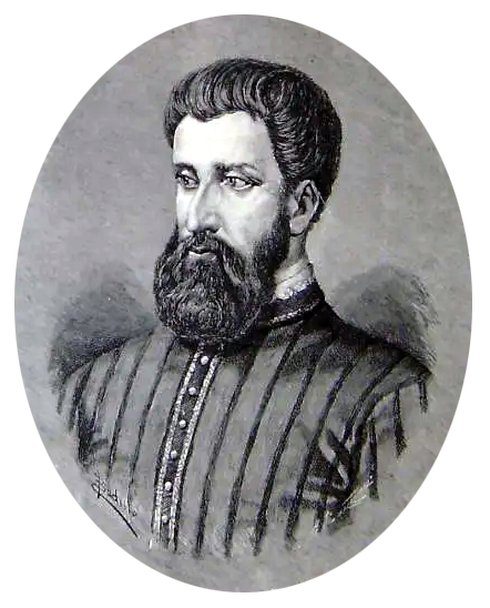 Gonzalo Jiménez de Quesada, conquistador español (s. XVI)